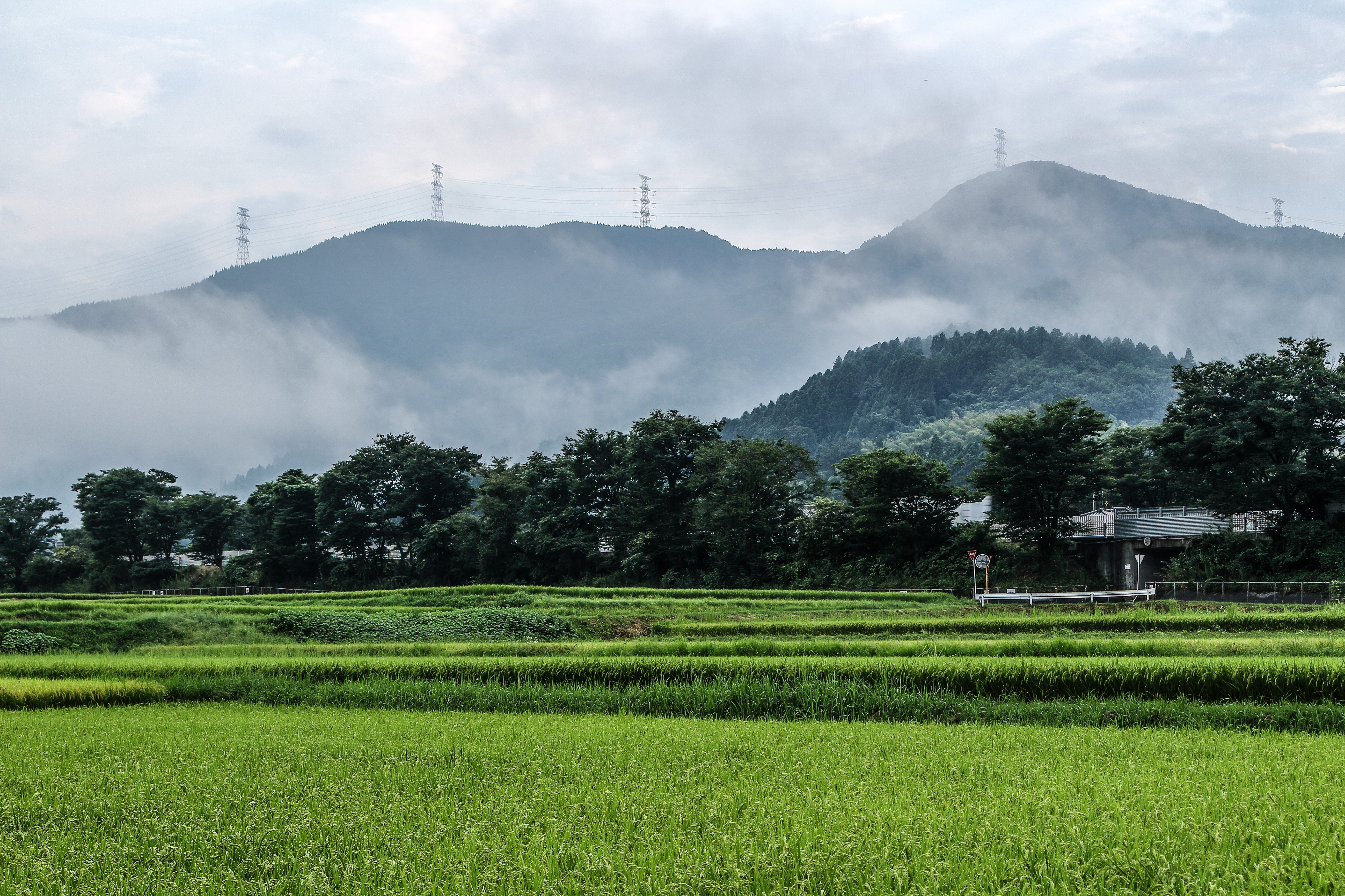 白石市福岡から撮影した鉢森山